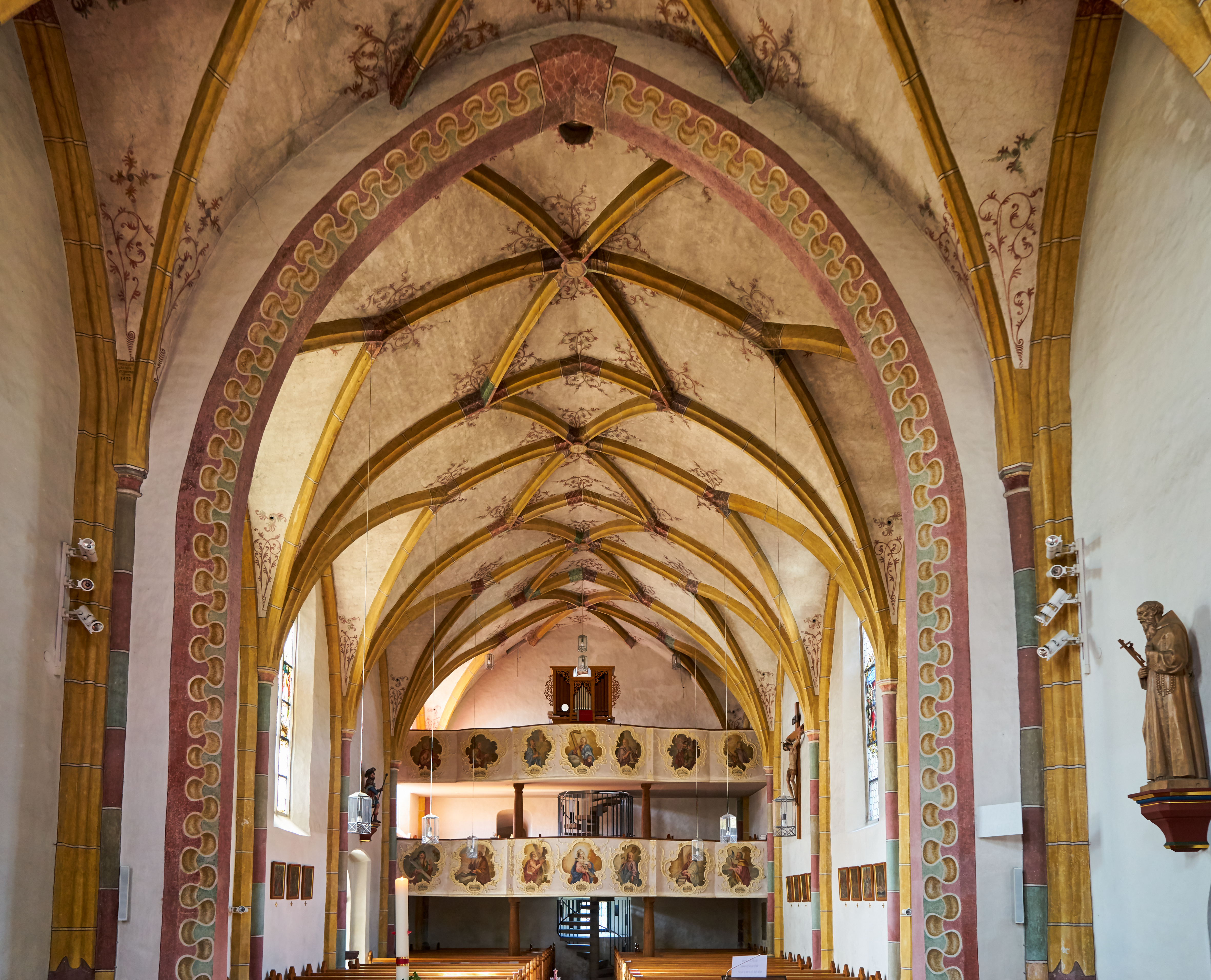 Katholische Pfarrkirche St. Aegidius Malching. Blick zur zweistöckigen Westempore von 1773 mit Rokokomalereien.